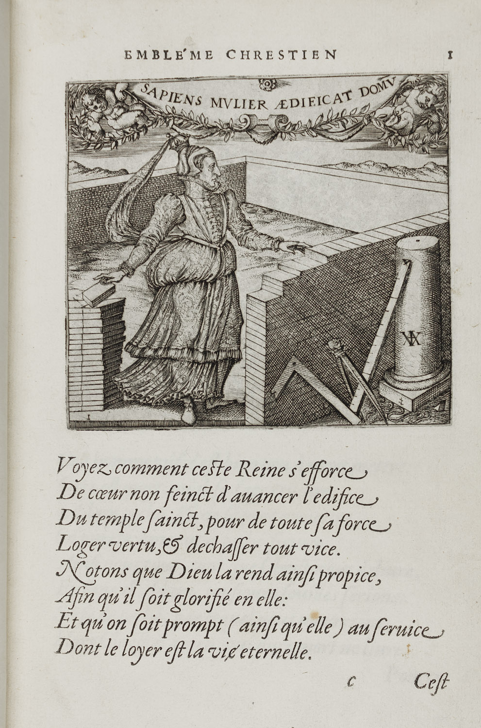 f. 1 de Montenay (Georgette), Emblèmes, ou devises esthéticiennes, composées par Damoiselle Georgette de Montenay, Lyon, 1571. Gravure à l'eau-forte et au burin sur papier vergé. 90 x 99 mm (cuvette) Bibliographie : Adhémar (Jean), Inventaire du fonds français : graveurs du seizième siècle, T. 2, Paris, Bibliothèque Nationale, 1938, p. 160, n°7a-1 Bibliothèque-médiathèque de Nancy, 1206